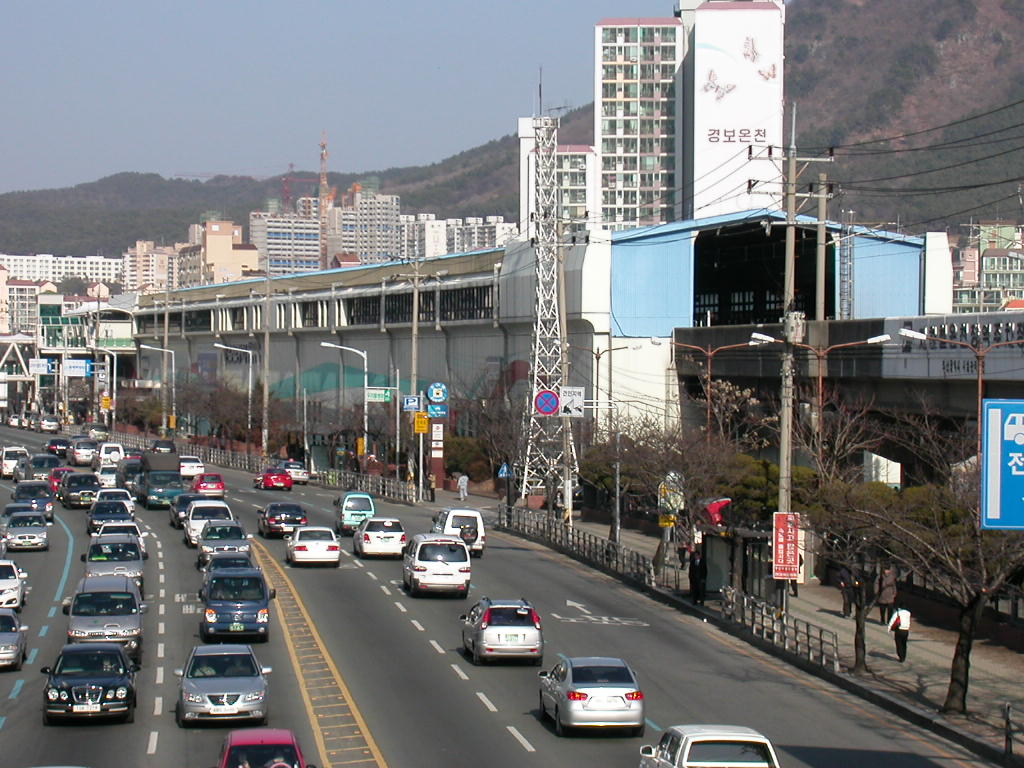 부산 도시철도 1호선 온천장역 역사